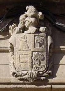 Escudo Casa Santonja - Palau dels Marau